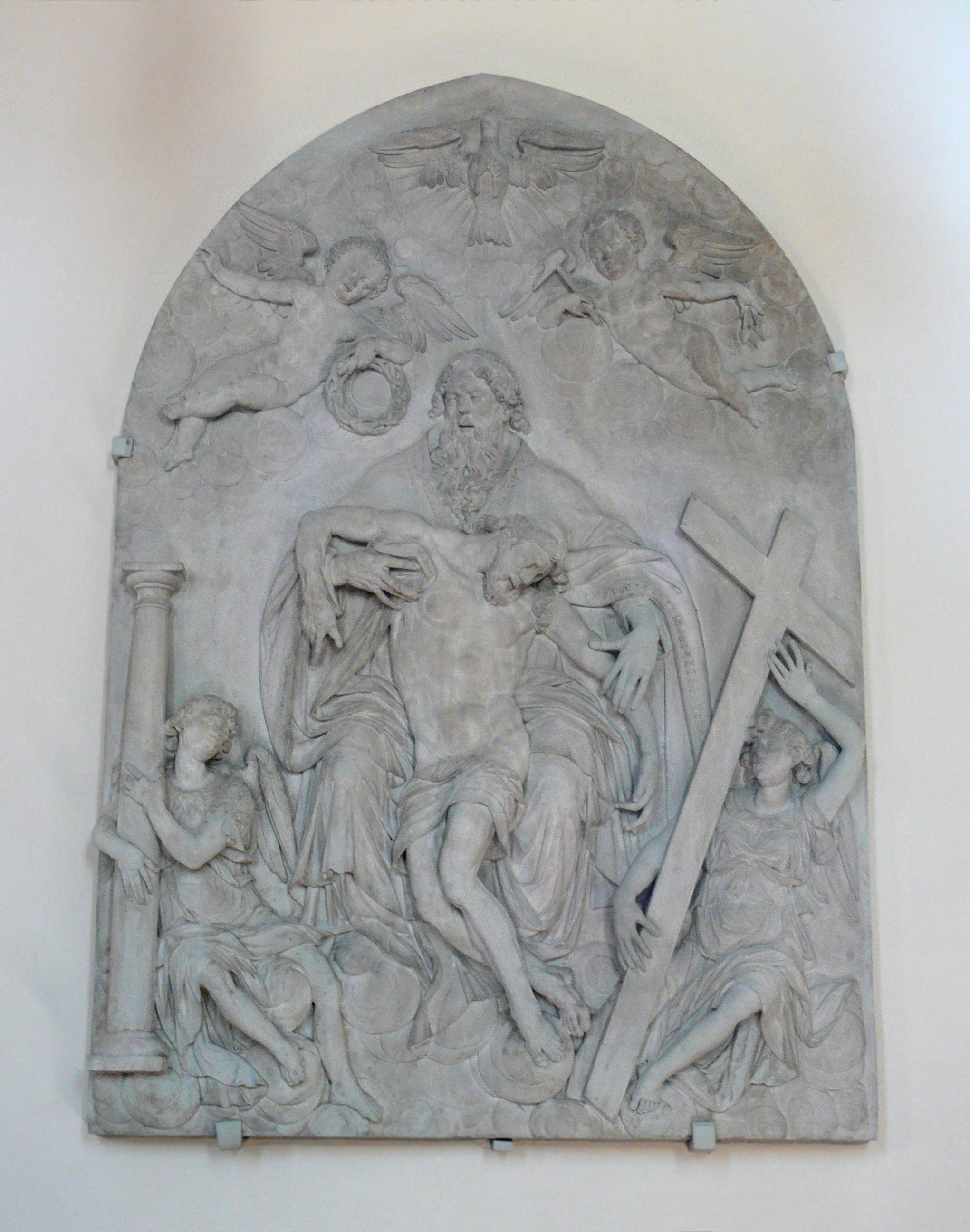 Pfarrkirche St. Sigismund, Hepbach (Ortsteil von Markdorf), Bodenseekreis Relief von Hans Morinck (1555–1616): Kreuzabnahme, 1596/1597, früher im Kreuzgang von Kloster Peterhausen (Konstanz); 1852 für Hepbach erworben Hans Morinck (1555–1616) Alternative namesMoring, HansDate of birth/deathcirca 15551616Location of birth/deathGorinchem, HollandKonstanzWork locationKonstanz (ab 1578)Authority control VIAF: 3266024 GND: 118736965